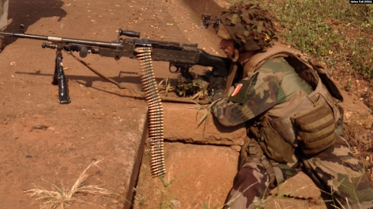 Les soldats français en position à Bangui, République Centrafricaine. Décembre 22, 2013. Peut être un soldat du 8e RPIMa [1] ?